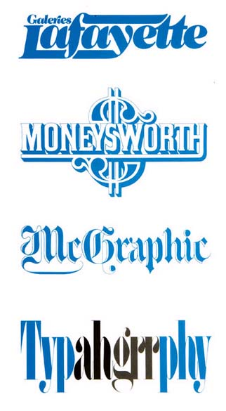 logos